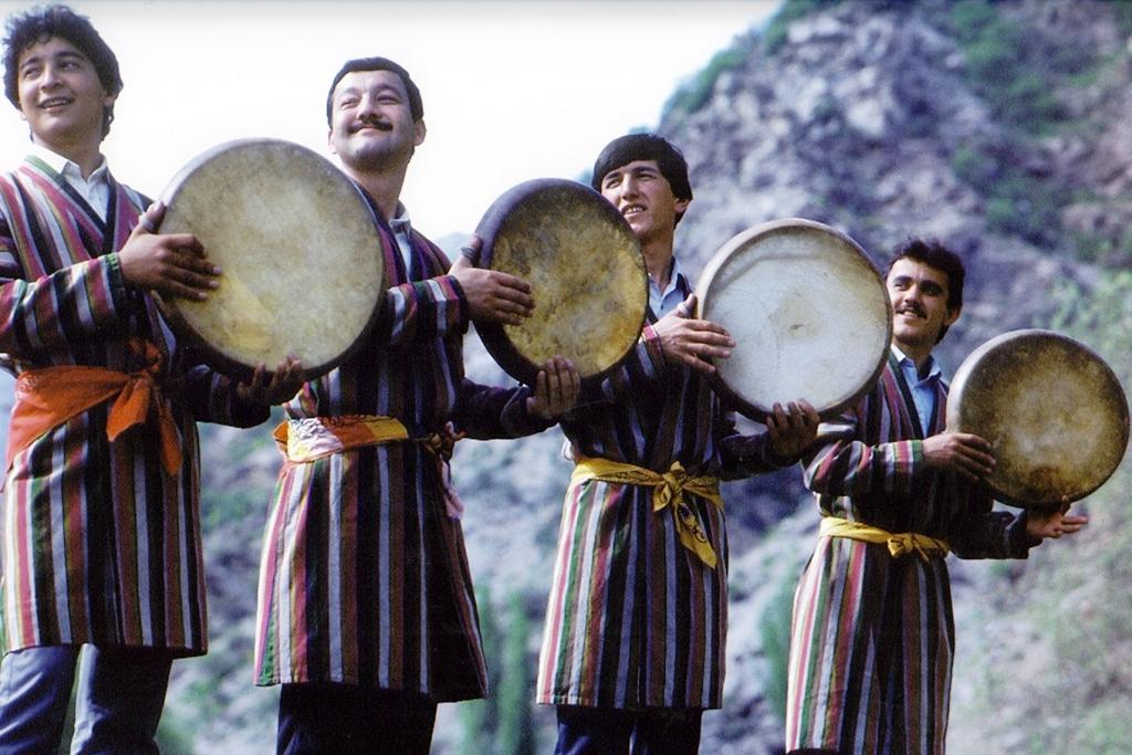 Дойристы.Студенческий ансамбль Таджикского национального университета, Таджикистан